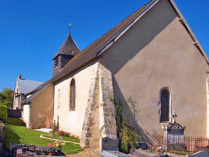 vue du sud-est